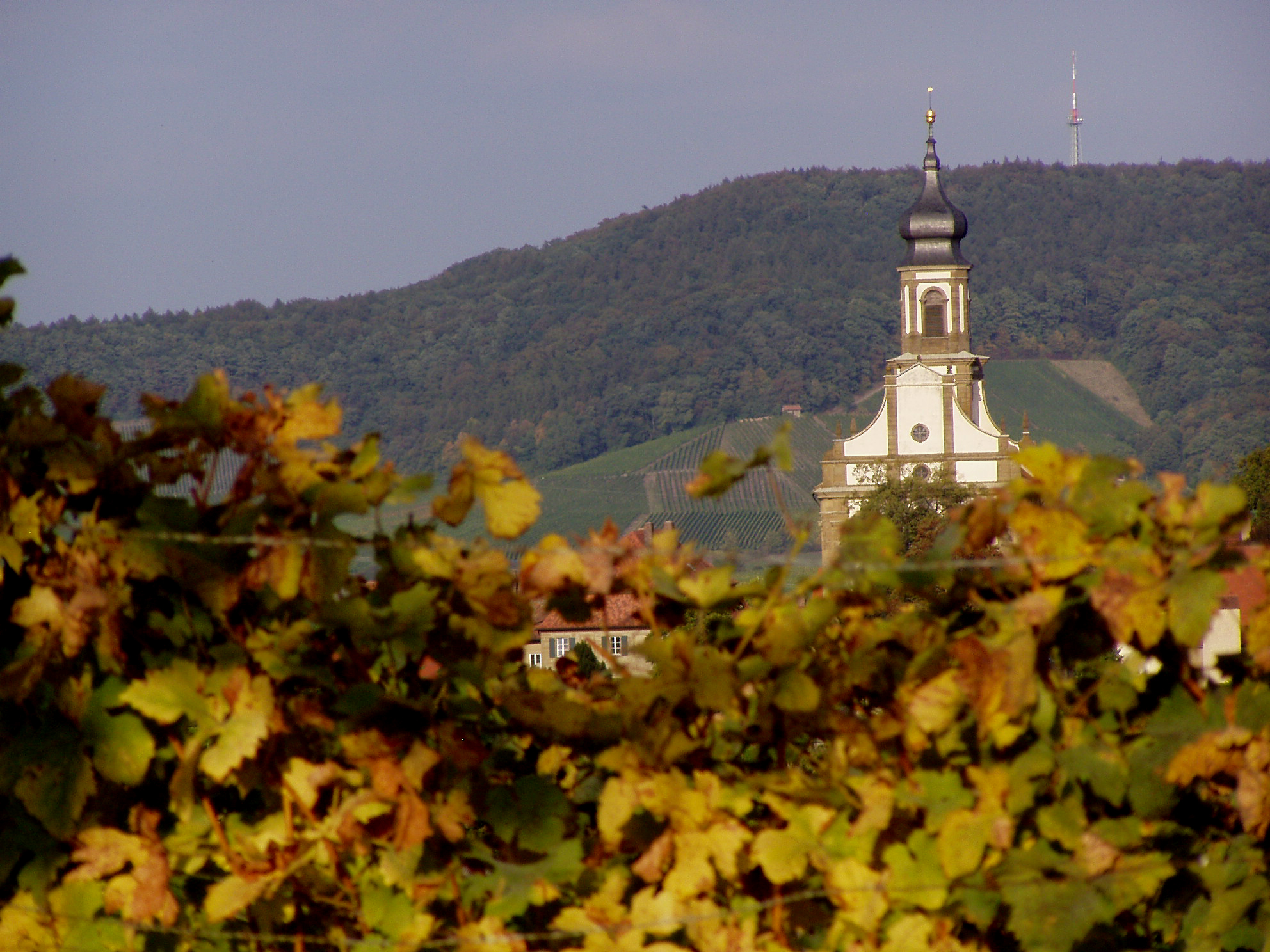 Casteller Grafschaftskirche vor der Kulisse des Friedrichsbergs/Steigerwald